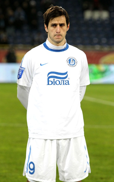 Перед матчем с ФК "Черноморец"